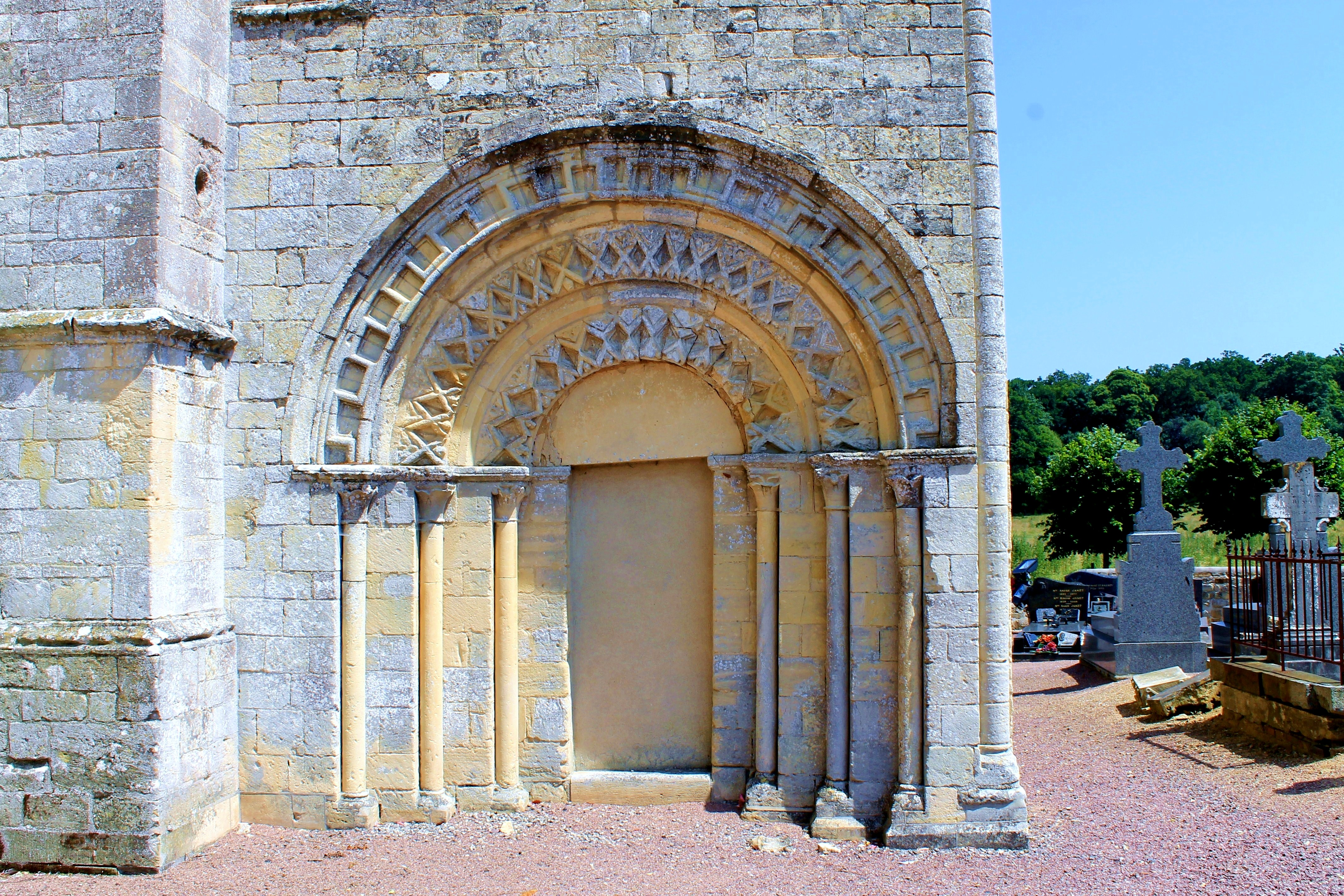 Portail aveugle du transept sud de l'église Notre-Dame d'Audrieu (Calvados) Base Mémoire